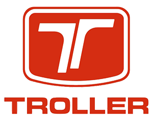 logo da marca Troller